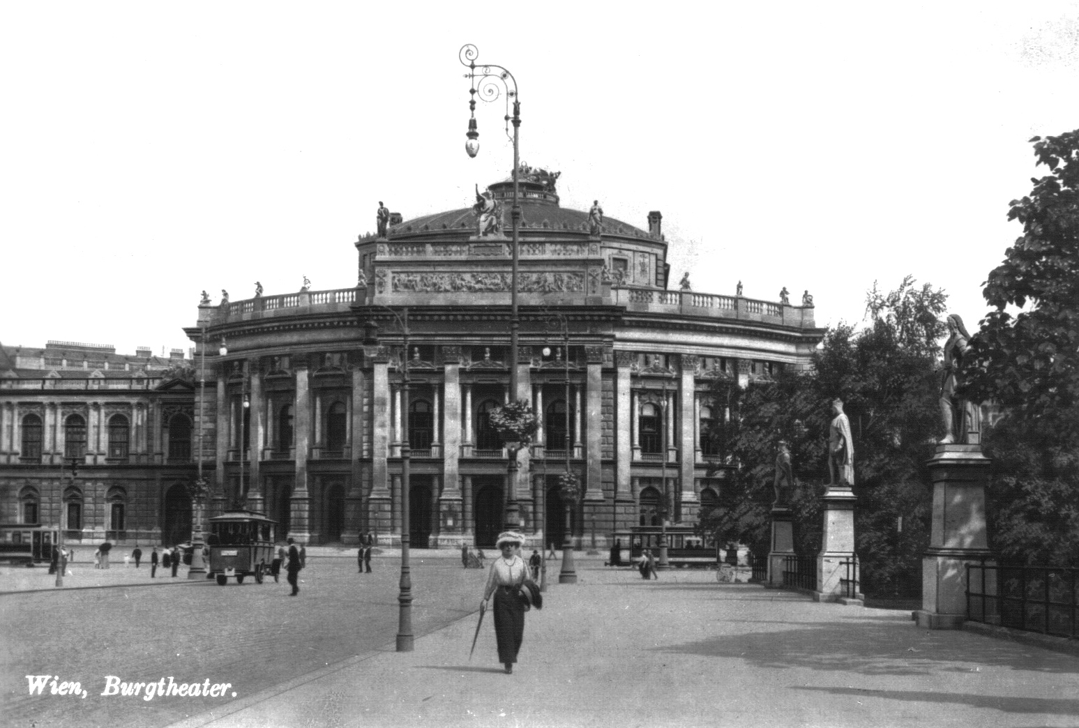 Burgtheater (right after its construction)